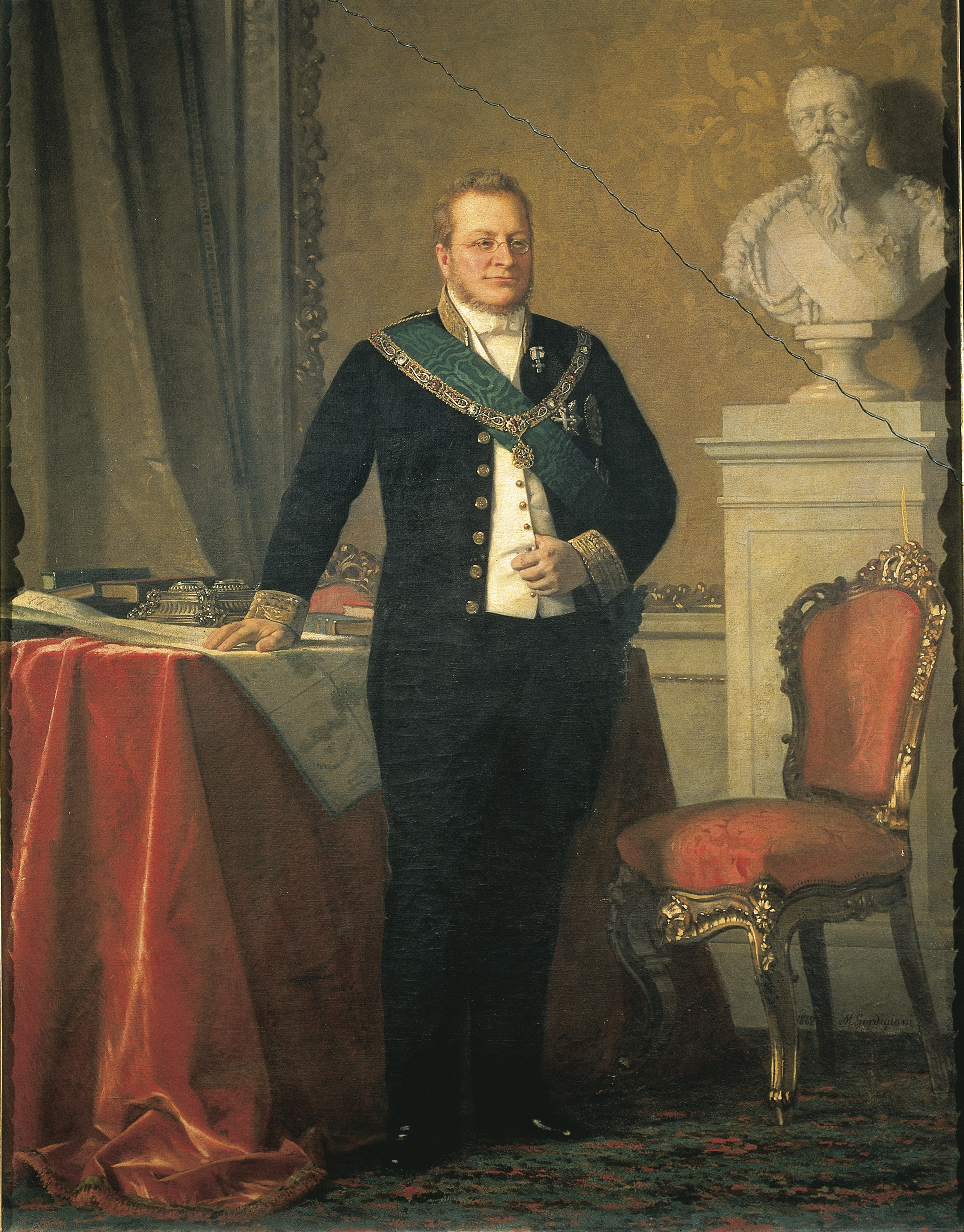 Portrait of Camillo Benso Conte di Cavour (1810-1861)